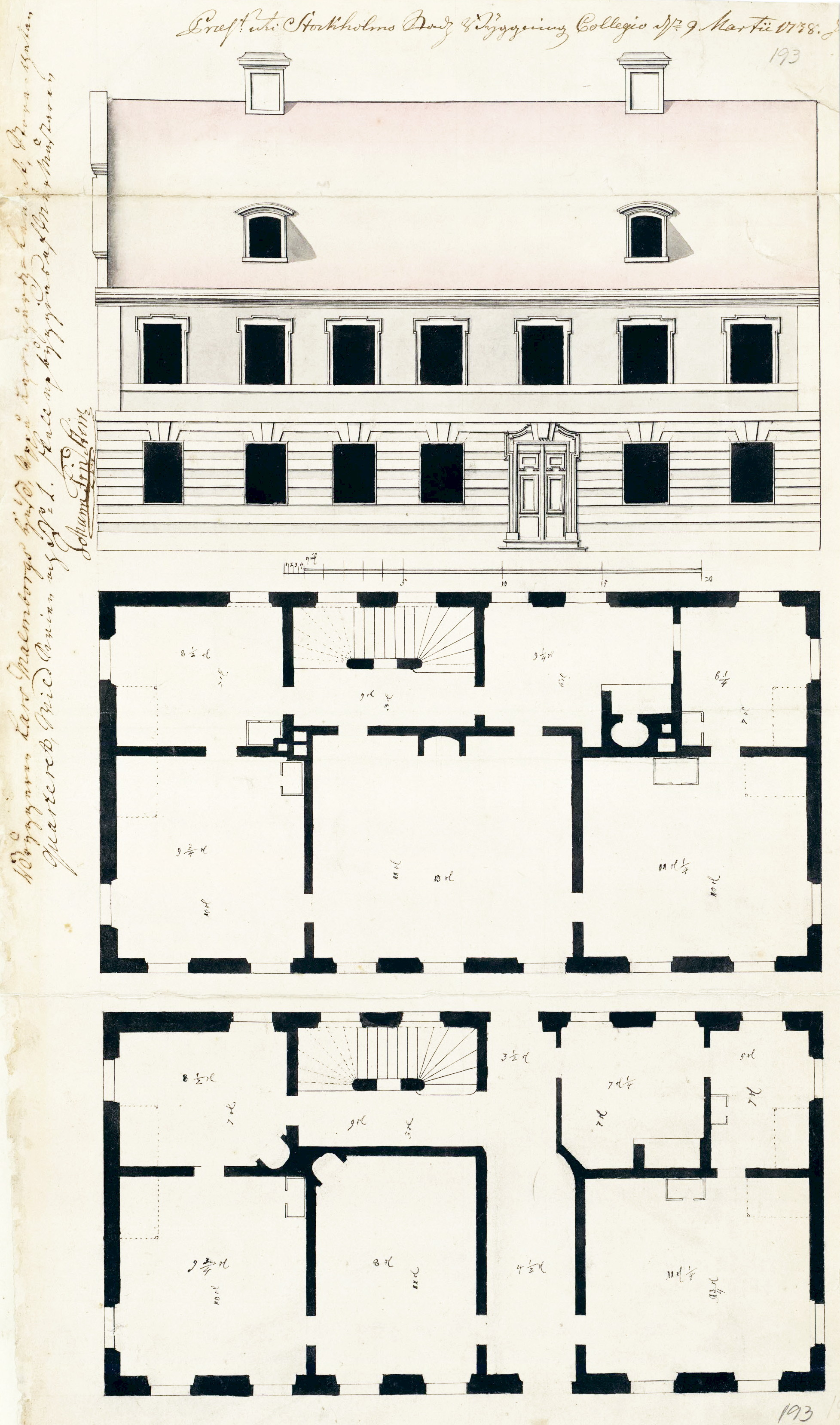 Bryggaren Lars Malmborgs nybygge i kvarteret Vildsvinet (dagens Östermalm 1:17)